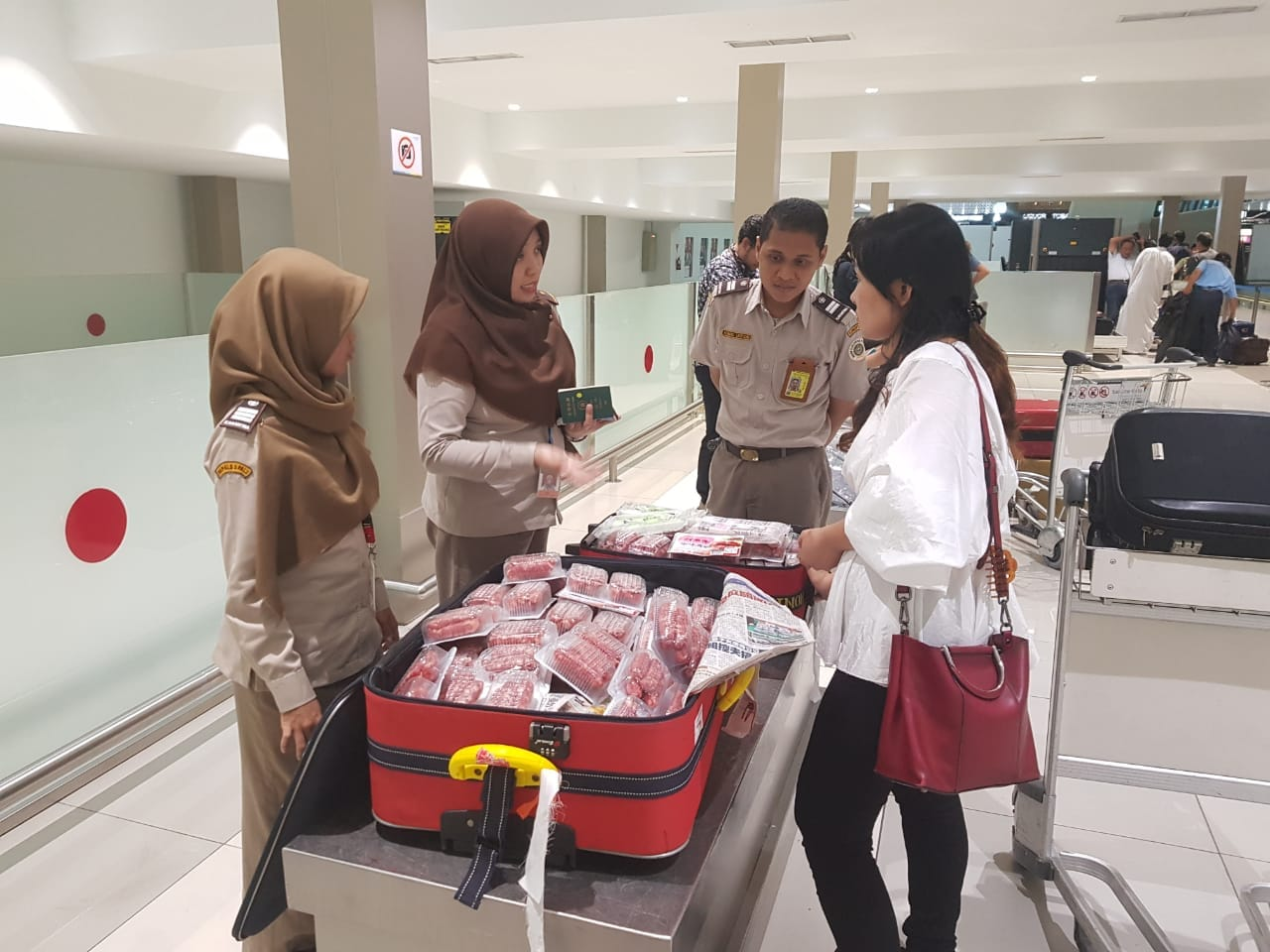 Pejabat karantina hewan memeriksa daging di tas kabin penumpang pesawat udara di Indonesia